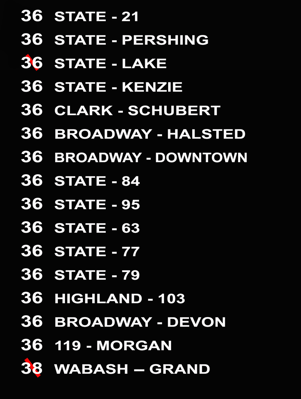 Zelfgemaakte media in Photoshop CS